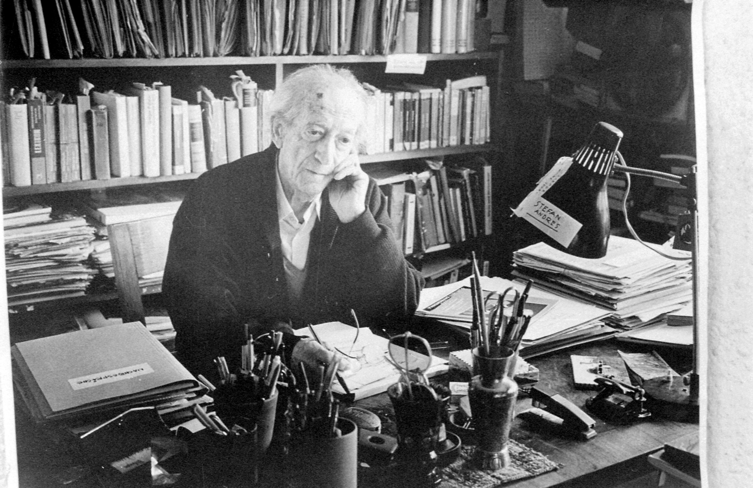 Oto Bihali Merin, slikar i istoričar umetnosti,1990. foto: Stevan Kragujević (po odobrenju kćerke Tanje Kragujević)